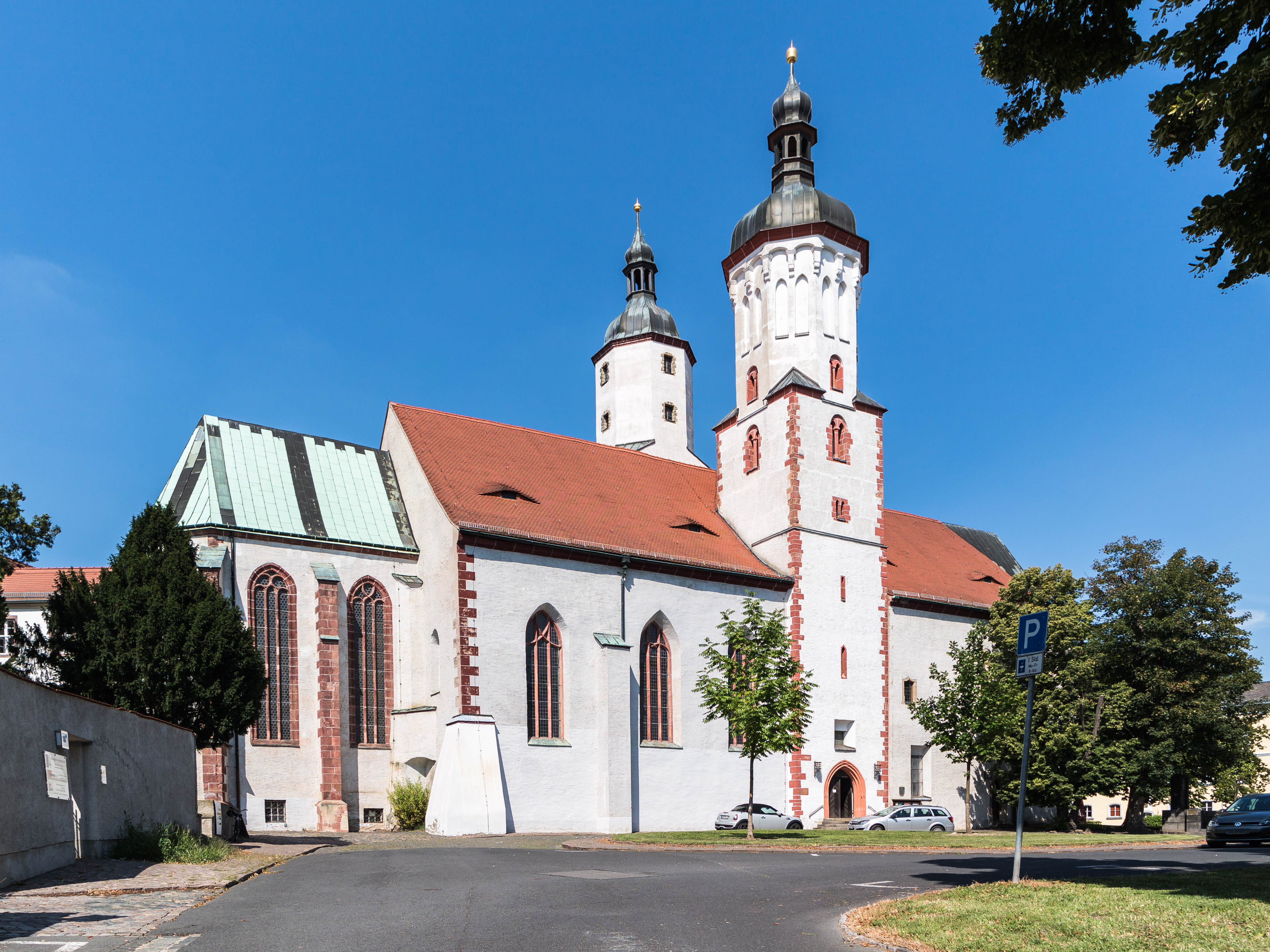 Dom St. Marien, Domplatz 2 in Wurzen